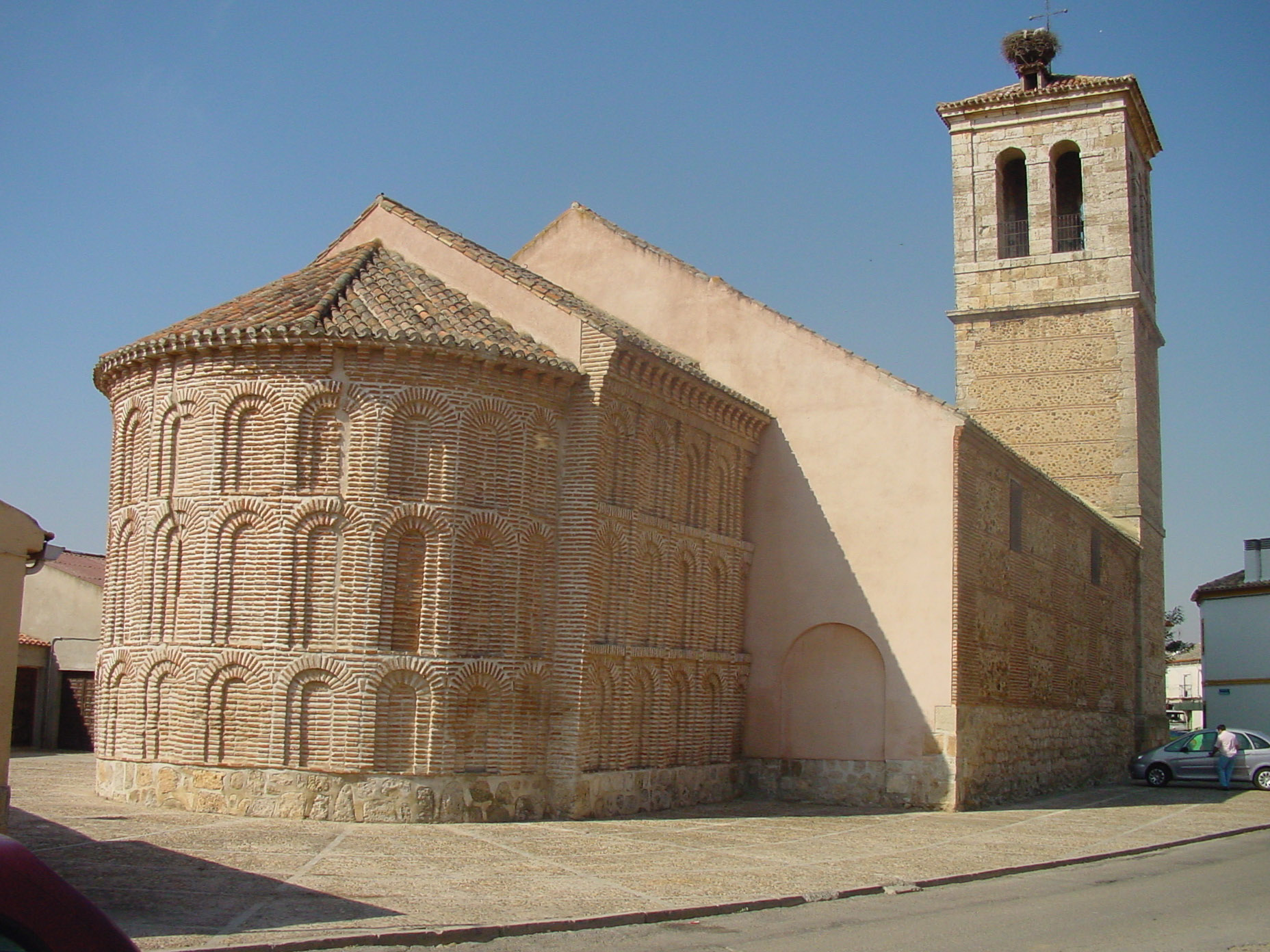 Iglesia de San Pedro Apóstol en Camarma de Esteruelas.